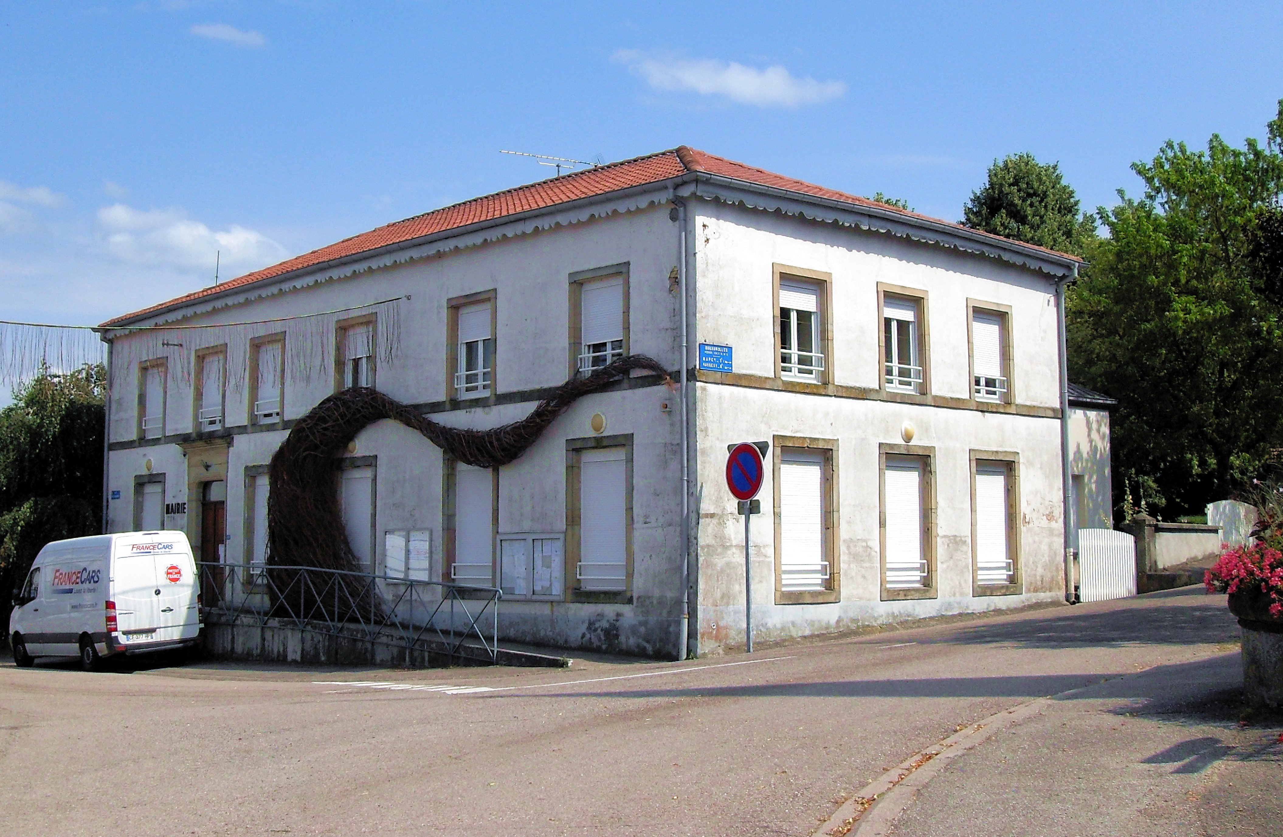 La mairie de Bouxurulles